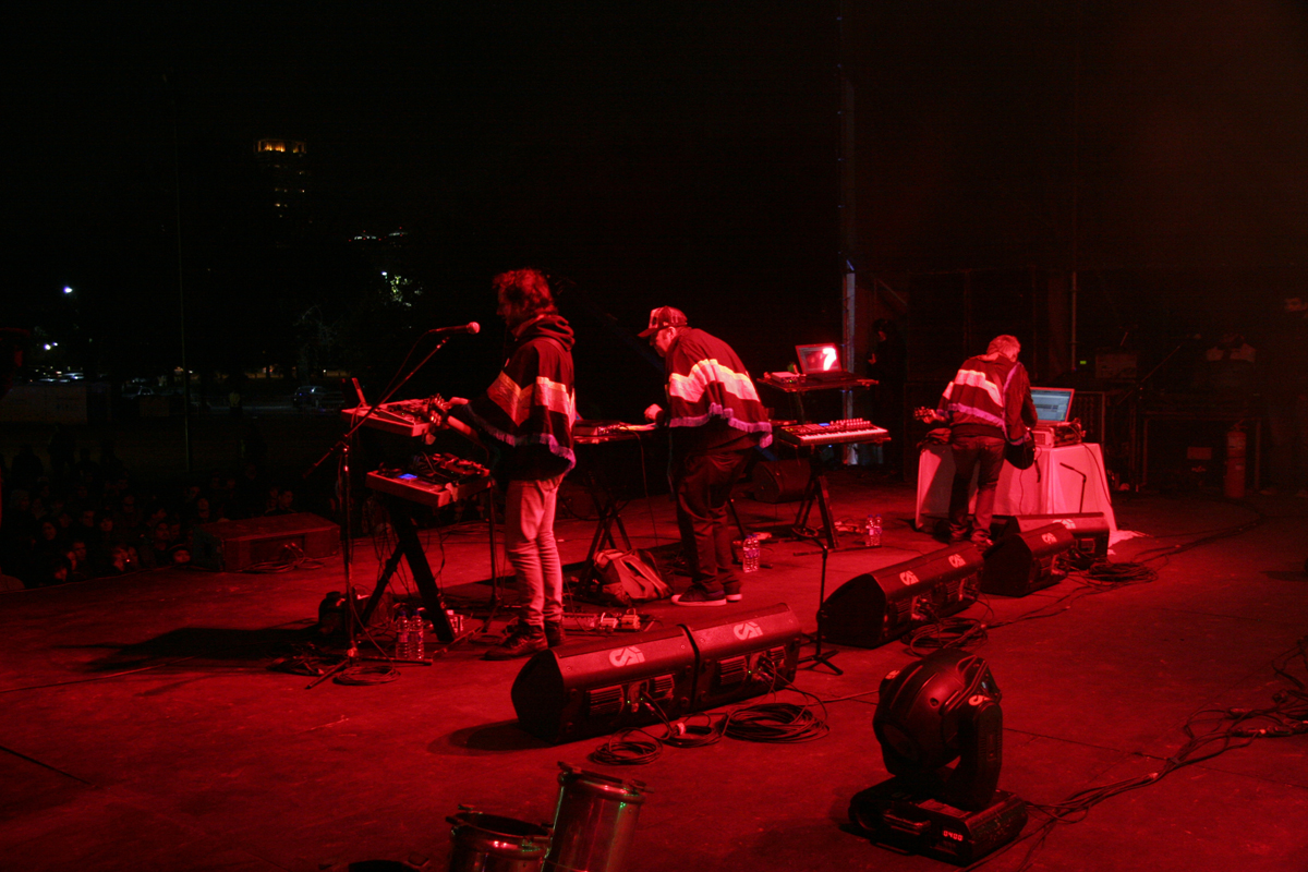 El trio Electrpop Poncho en vivo